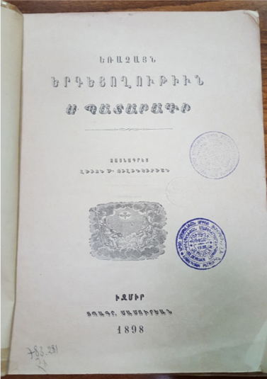 Լեւոն Չիլինկիրեան, «Եռաձայն Երգեցողութիւն Ս. Պատարագի», Իզմիր, 1898 թ.